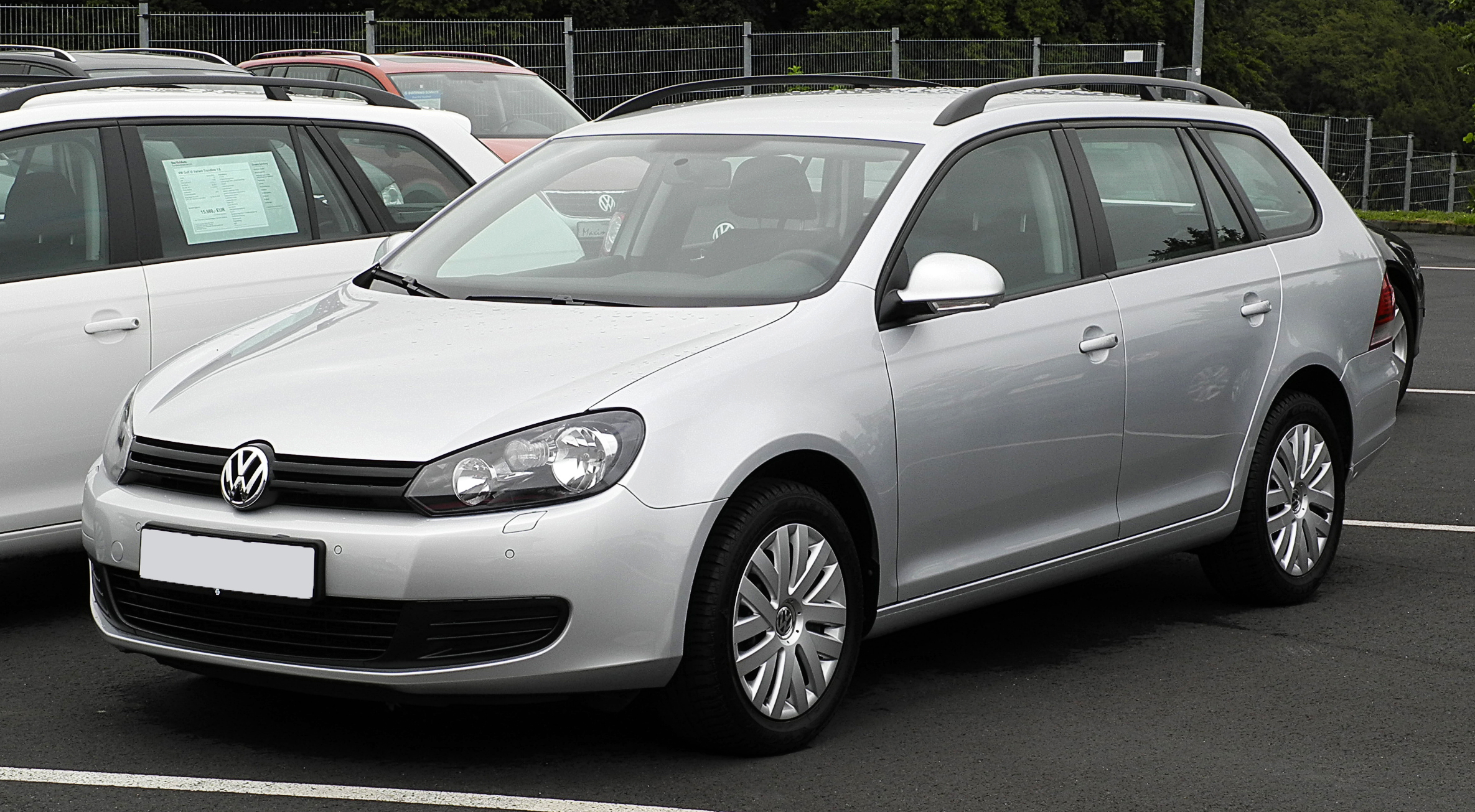 VW Golf Variant 1.6 TDI Trendline (VI)